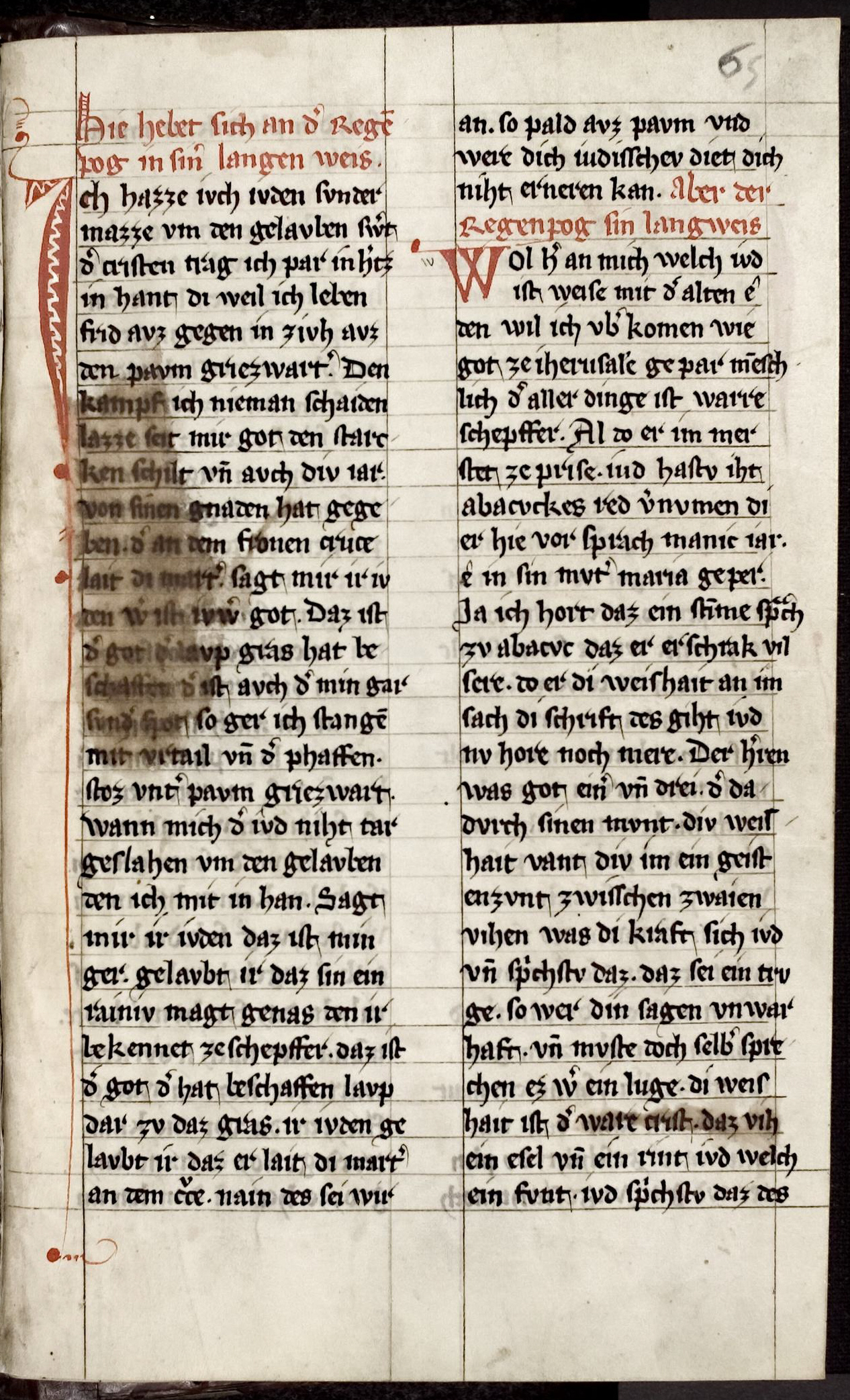 Heidelberger Liederhandschrift cpg 350; Universitätsbibliothek Heidelberg, cpg 350, fol. 65r